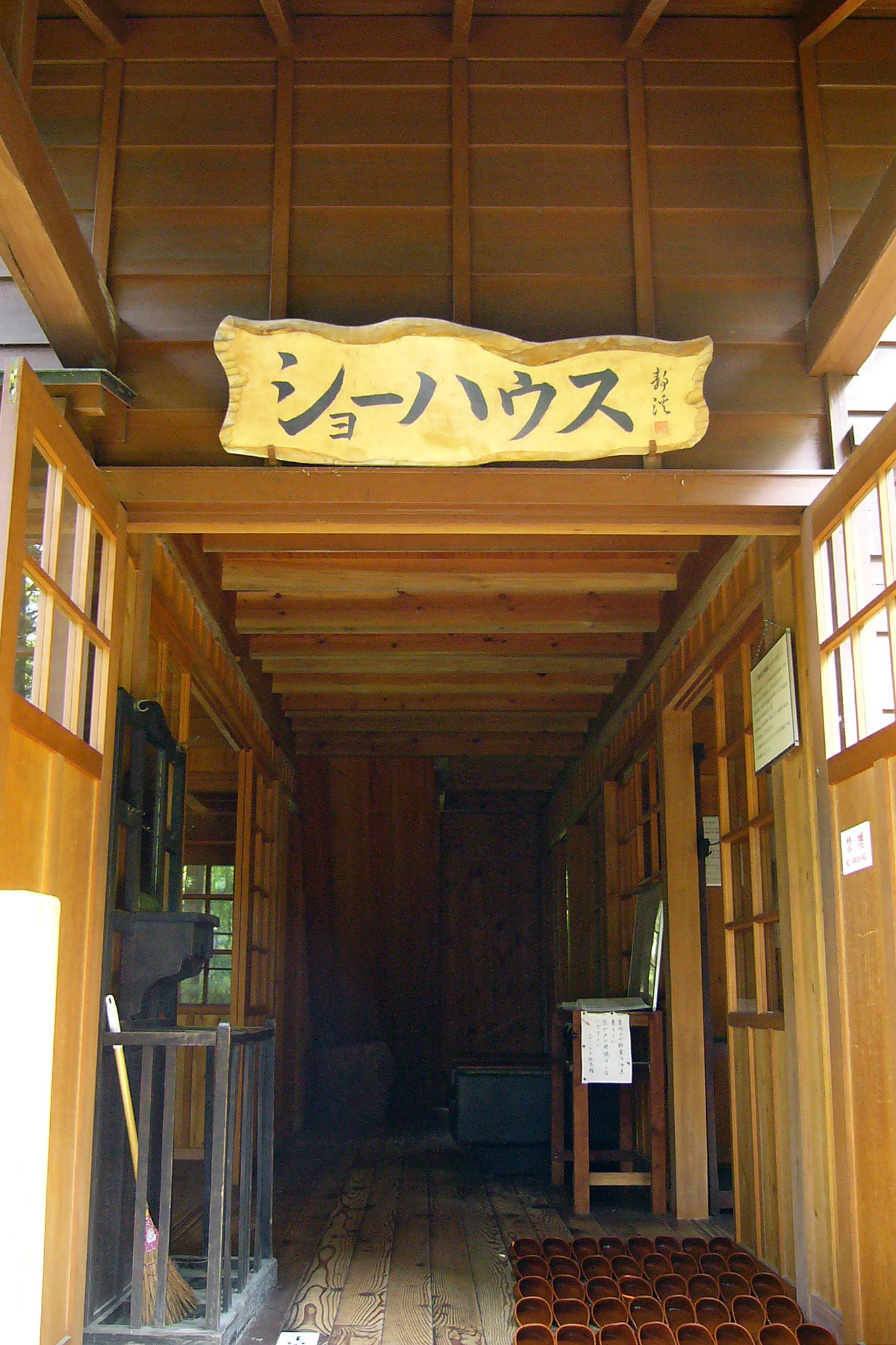 Shaw house in Karuizawa, Nagano, Japan